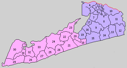 愛知県渥美郡の町村制時点の町村。